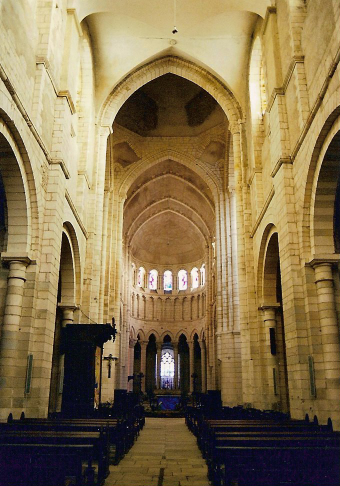 Church in La Charité sur Loire